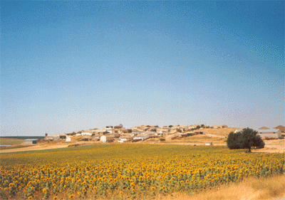 Vista general del pueblo de Chumillas